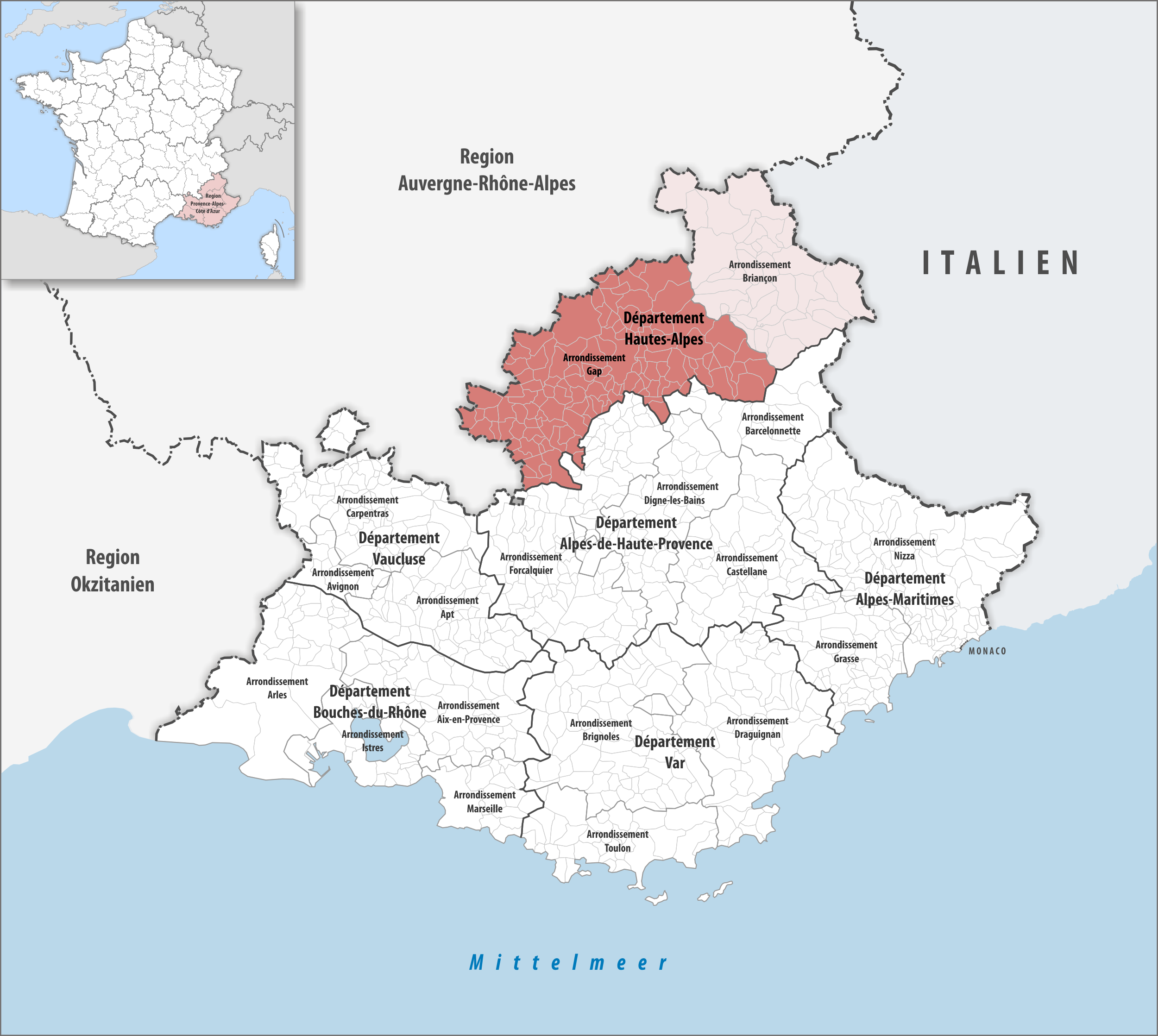 Lage des Arrondissements Gap